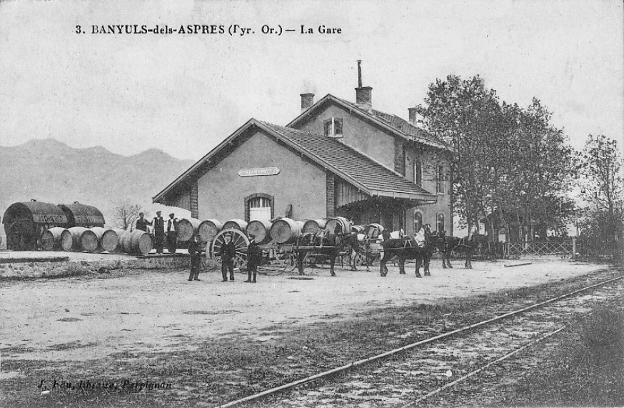 La gare de Banyuls-dels-Aspres avec son bâtiment voyageurs, sa halle à marchandises et son quais de chargement, avec des barriques.